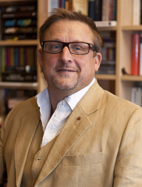 Potrait Lutz Johannsen